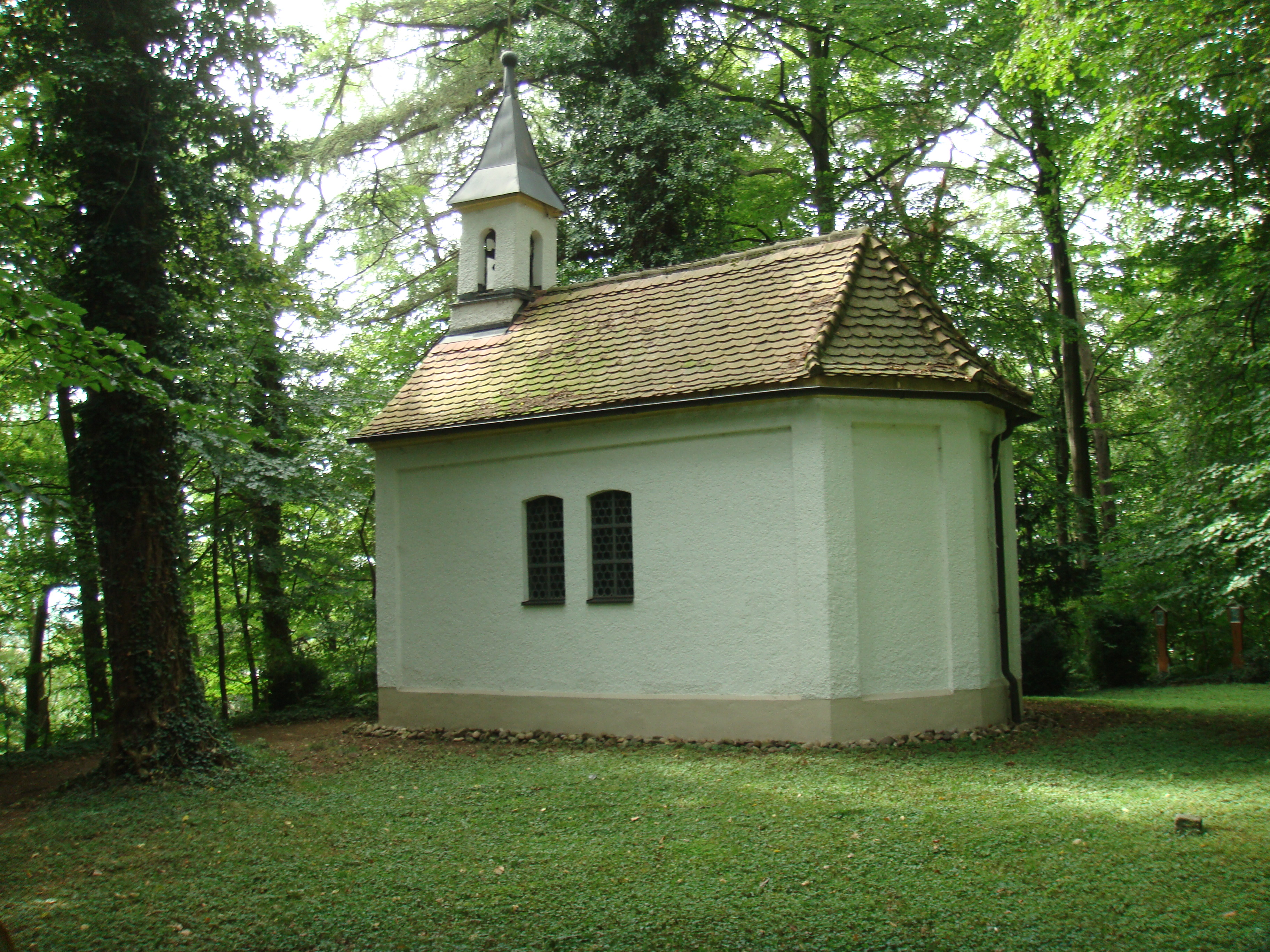 Mariahilfkapelle auf dem Schlossberg